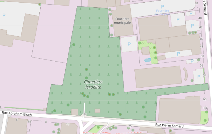 Carte du cimetière de la Mouche (Lyon).